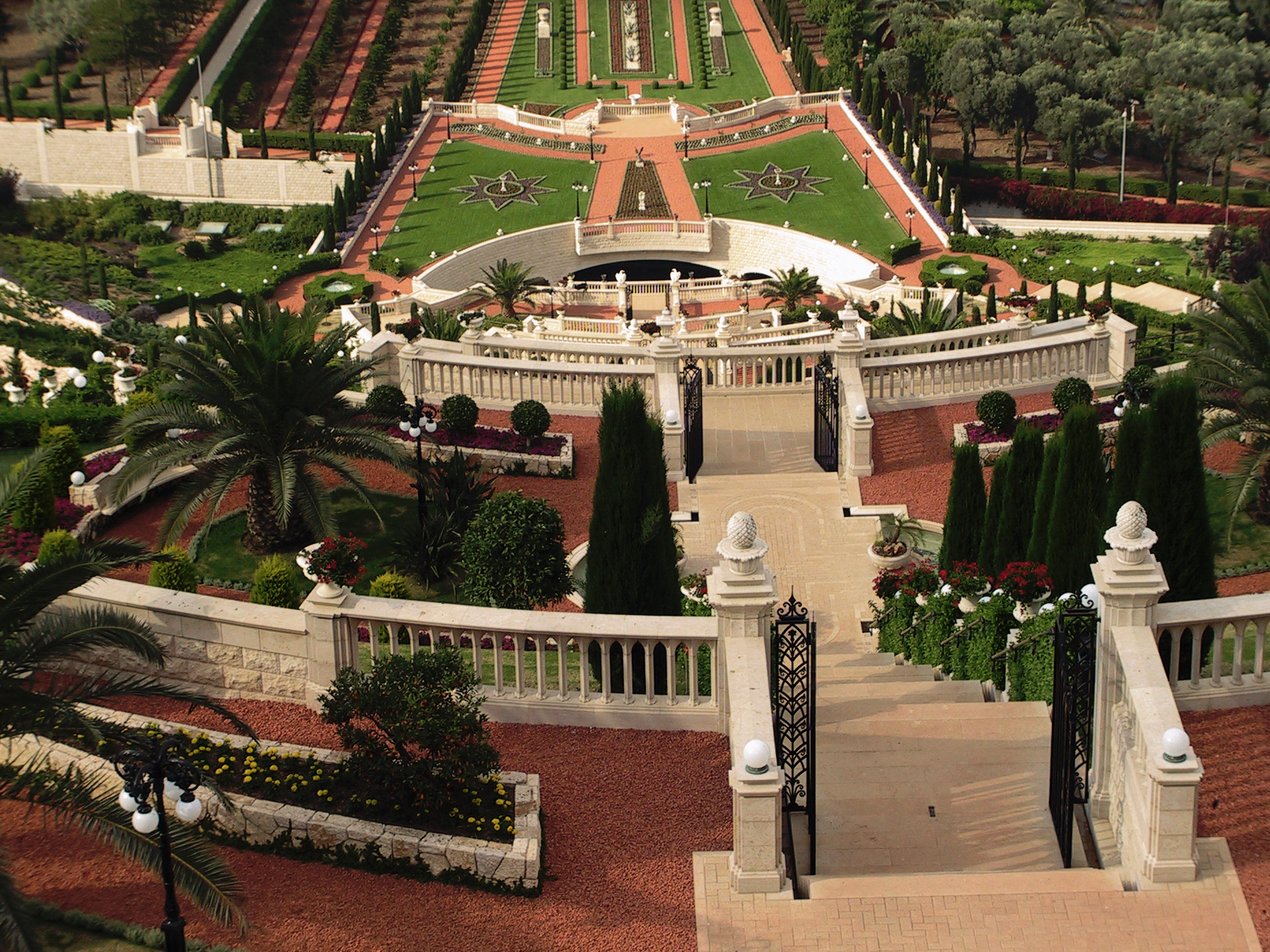 Hanging Gardens, Haifa, Israel